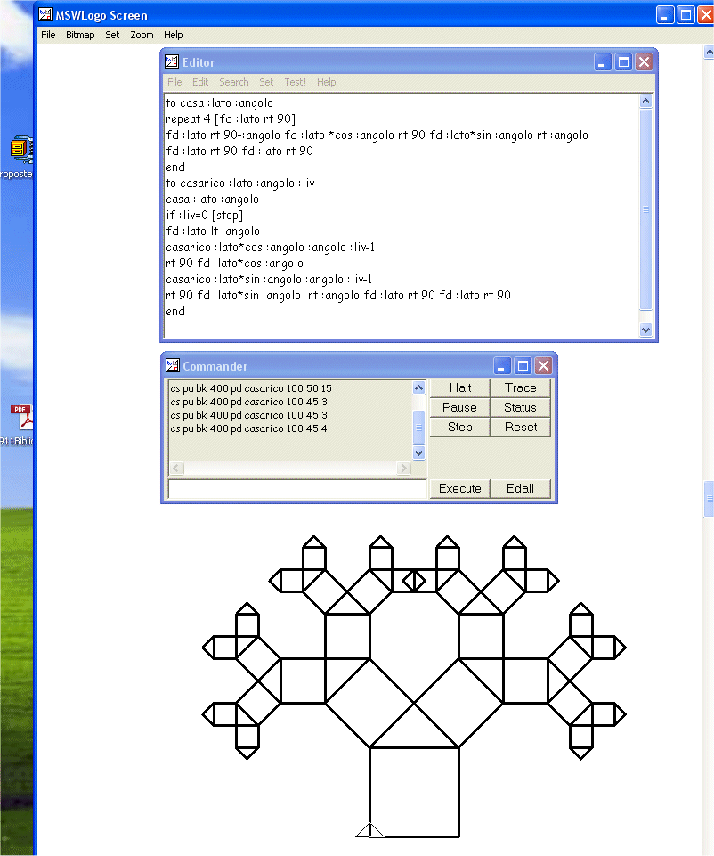 Albero di Pitagora ai vari livelli realizzati con MSWLogo